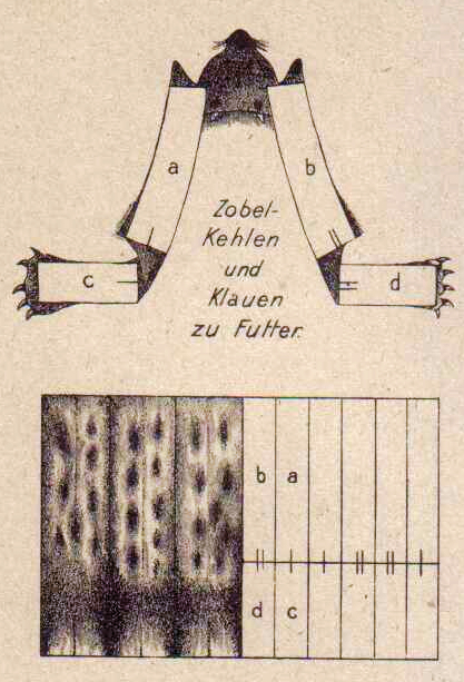 Graphics for Furriers Zobel-Kehlen und Klauen zu Futter' Zobelstirnen zu Futter